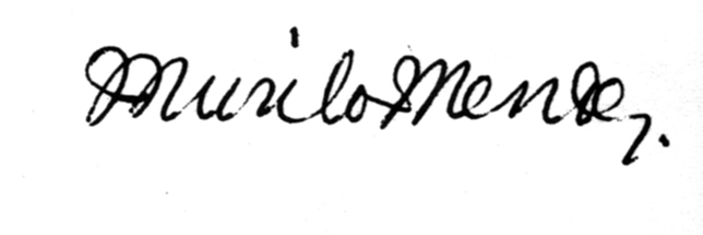 Assinatura de Murilo Monteiro Mendes